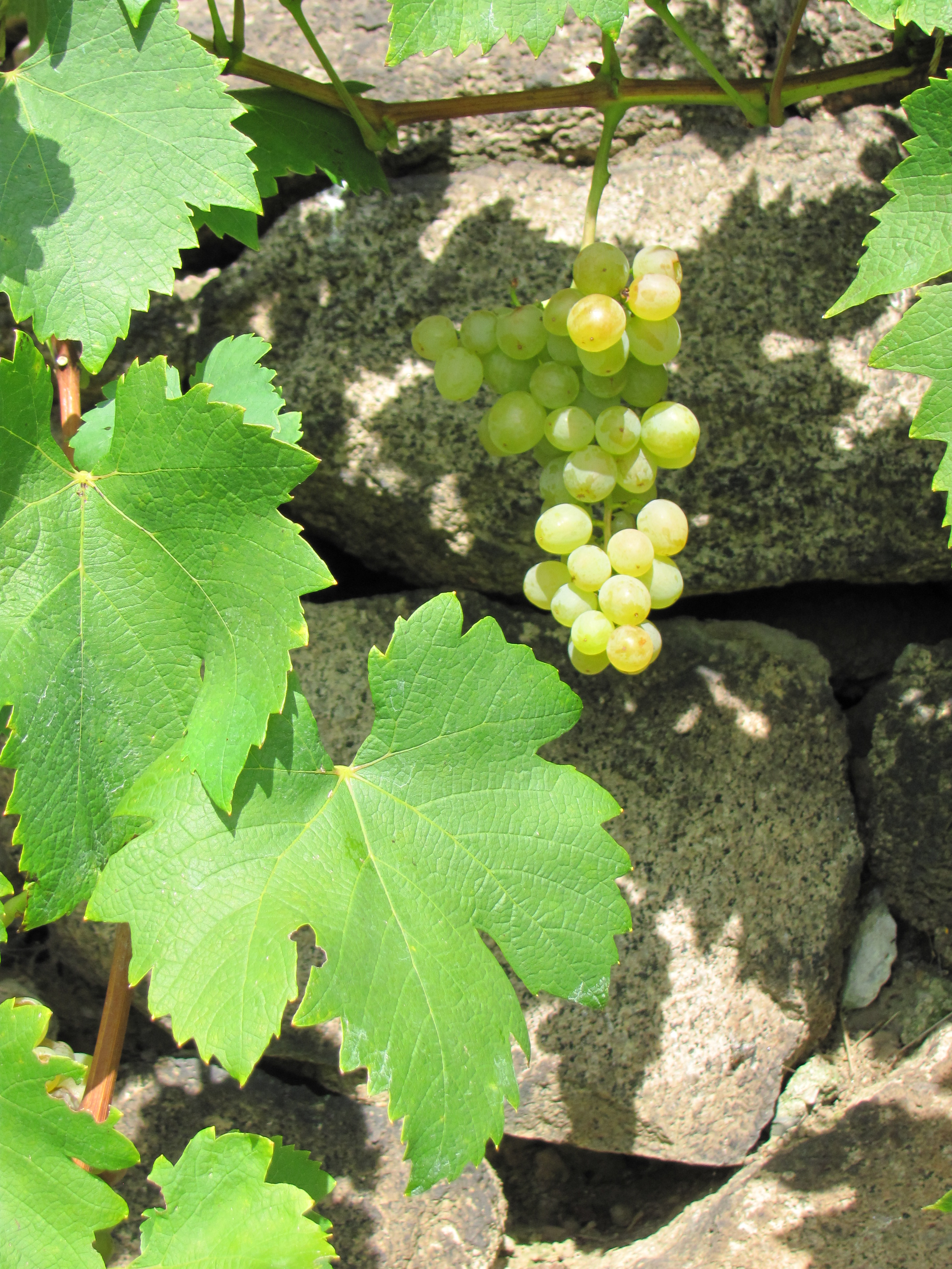 Radebeul-Oberlößnitz, Goldener Wagen, Frühe Leipziger im August 2014 (1)